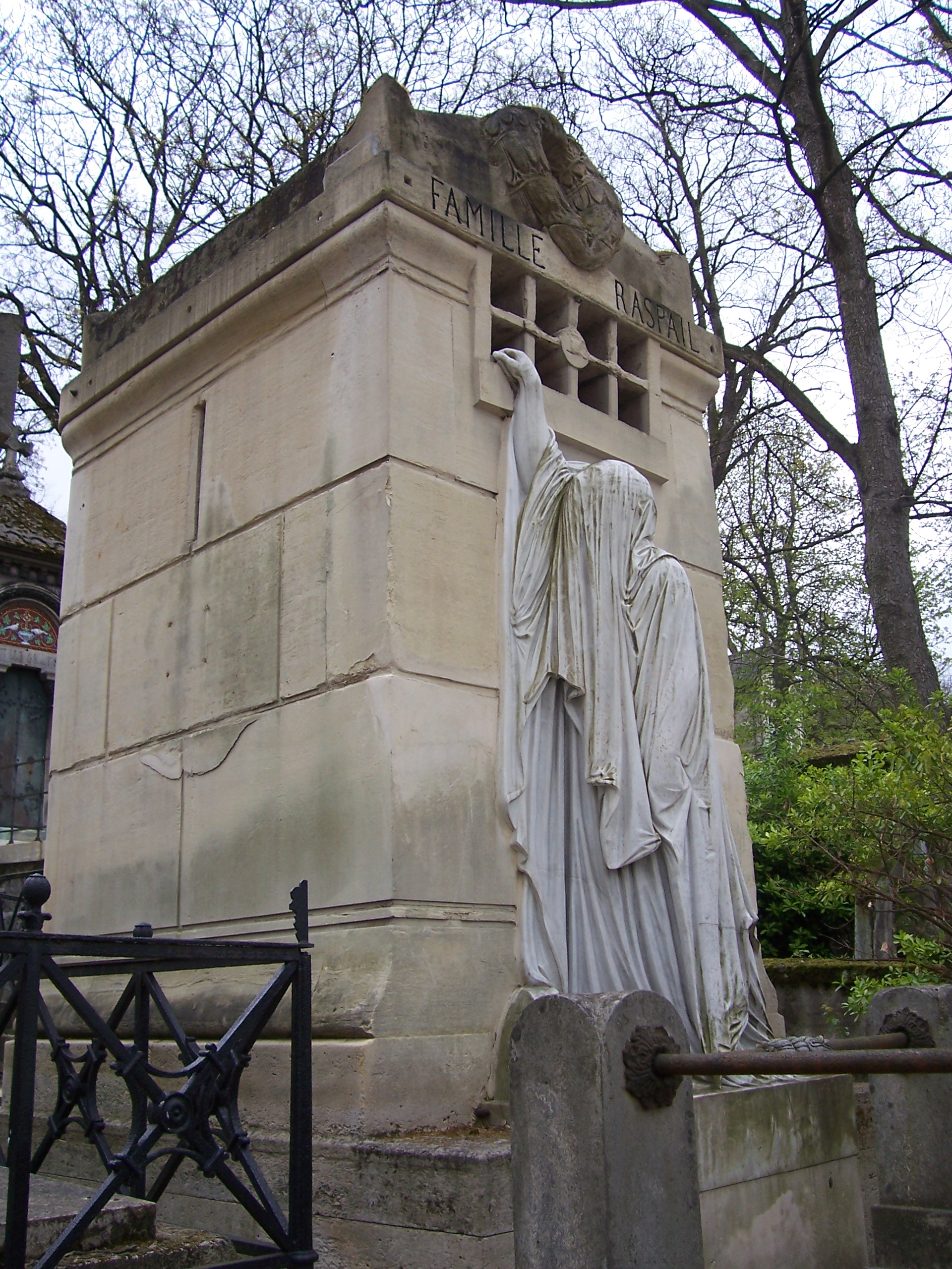 tombeau des Raspail au cimetière du Père Lachaise.